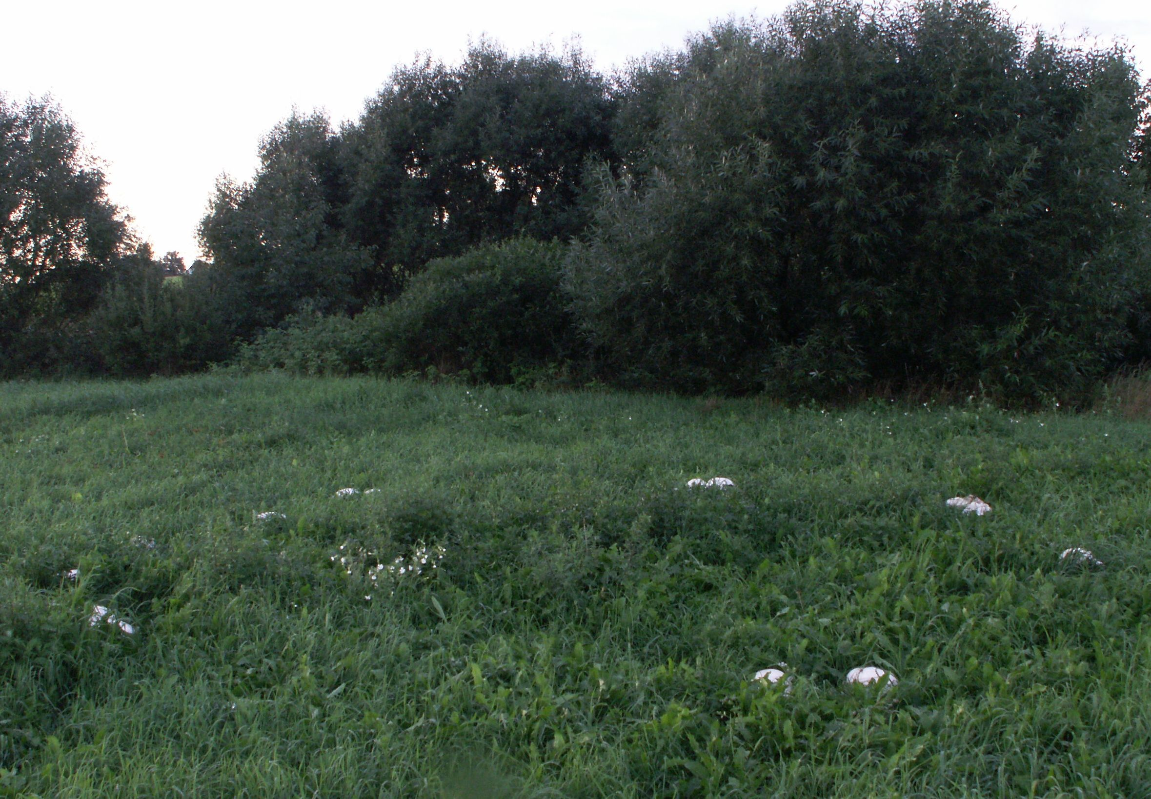 Langermannia gigantea, hexenring